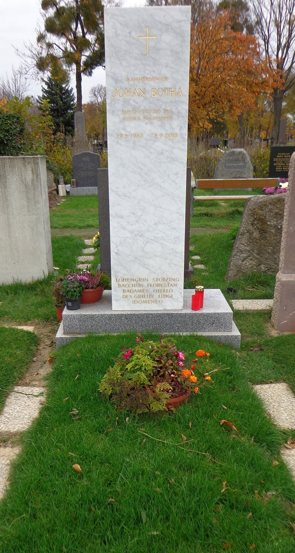 Wiener Zentralfriedhof - Gruppe 40: ehrenhalber gewidmetes Grab von Johan Botha